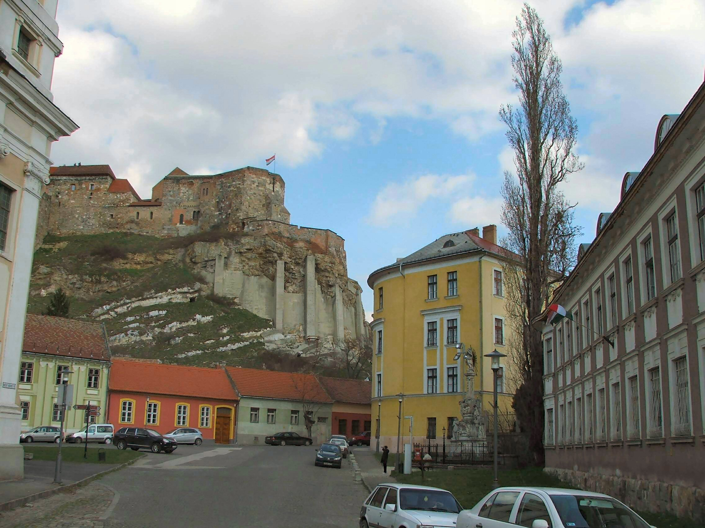 Esztergom, Mindszenty square